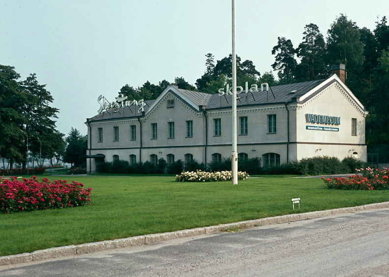 Skönhetsinstitutet Shantung-skolan beläget söder om Alviks T-banestation, Alvik, Bromma, väster om Stockholm, 1965. Fotonummer DIA 13664. Shantung-skolan, Alvik.